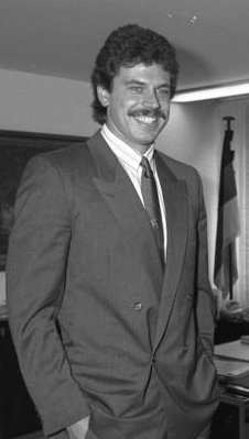 22.10.1987 Parlamentarischer Staatssekretär Carl-Dieter Spranger empfängt den Zehnkämpfer Jürgen Hingsen im Bundesministerium des Innern